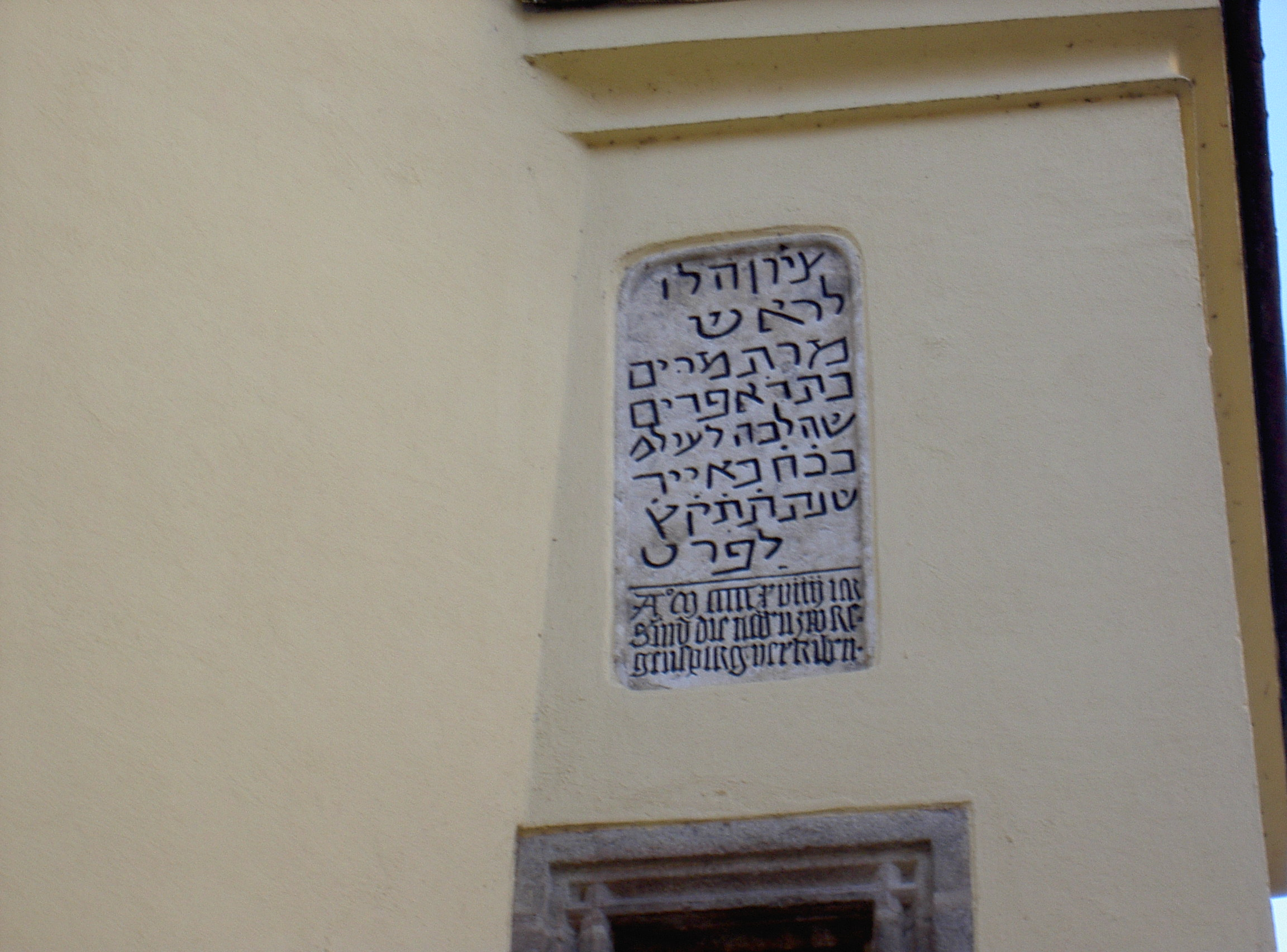 Rathaus Cham